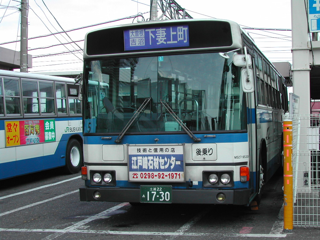 土浦駅前にて撮影